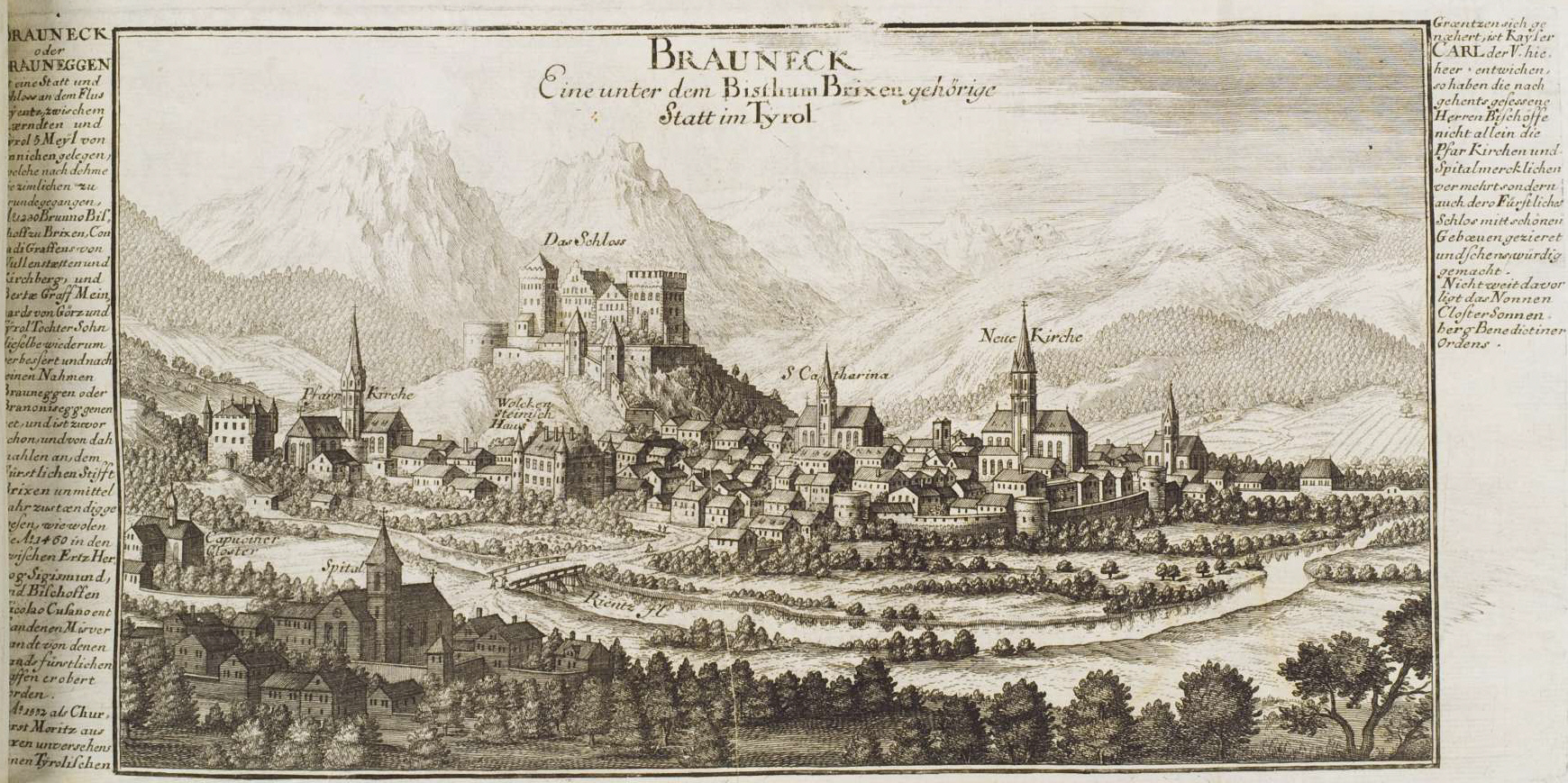 Curioses Staats und Kriegs Theatrum Dermahliger Begebenheiten im Tyrol : durch Unterschiedliche Geographische, Hydrographische, Topographische, Chronologische, Genealogische, Historische &c. Carten, Abrisse, und Tabellen Erlaeutert, Augspurg : Stridbeck, [ca. 1700] Brauneck